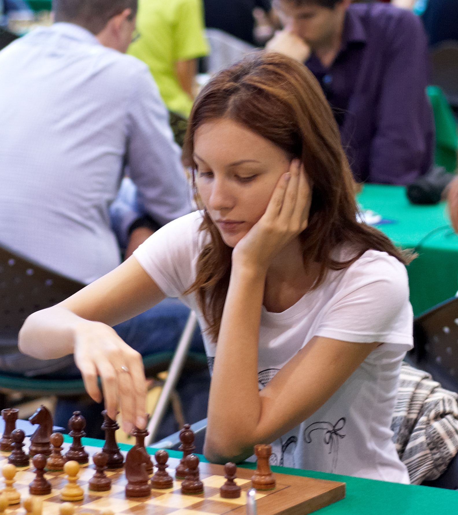 WFM Diana Baciu, Memoriał Mieczysława Najdorfa, Warszawa 2012.